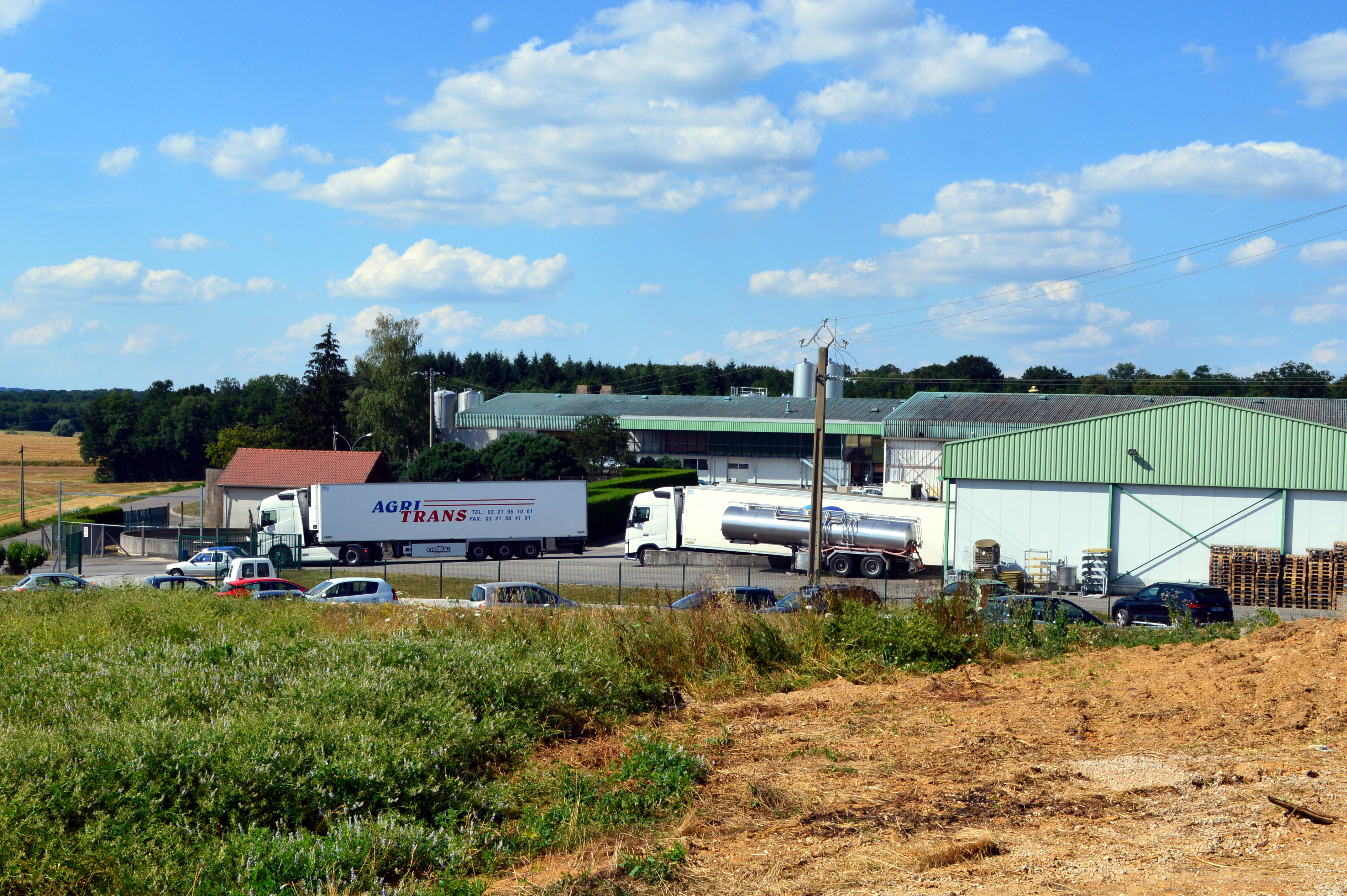 La Fromagerie Le Centurion, à Noironte, en juillet 2018.